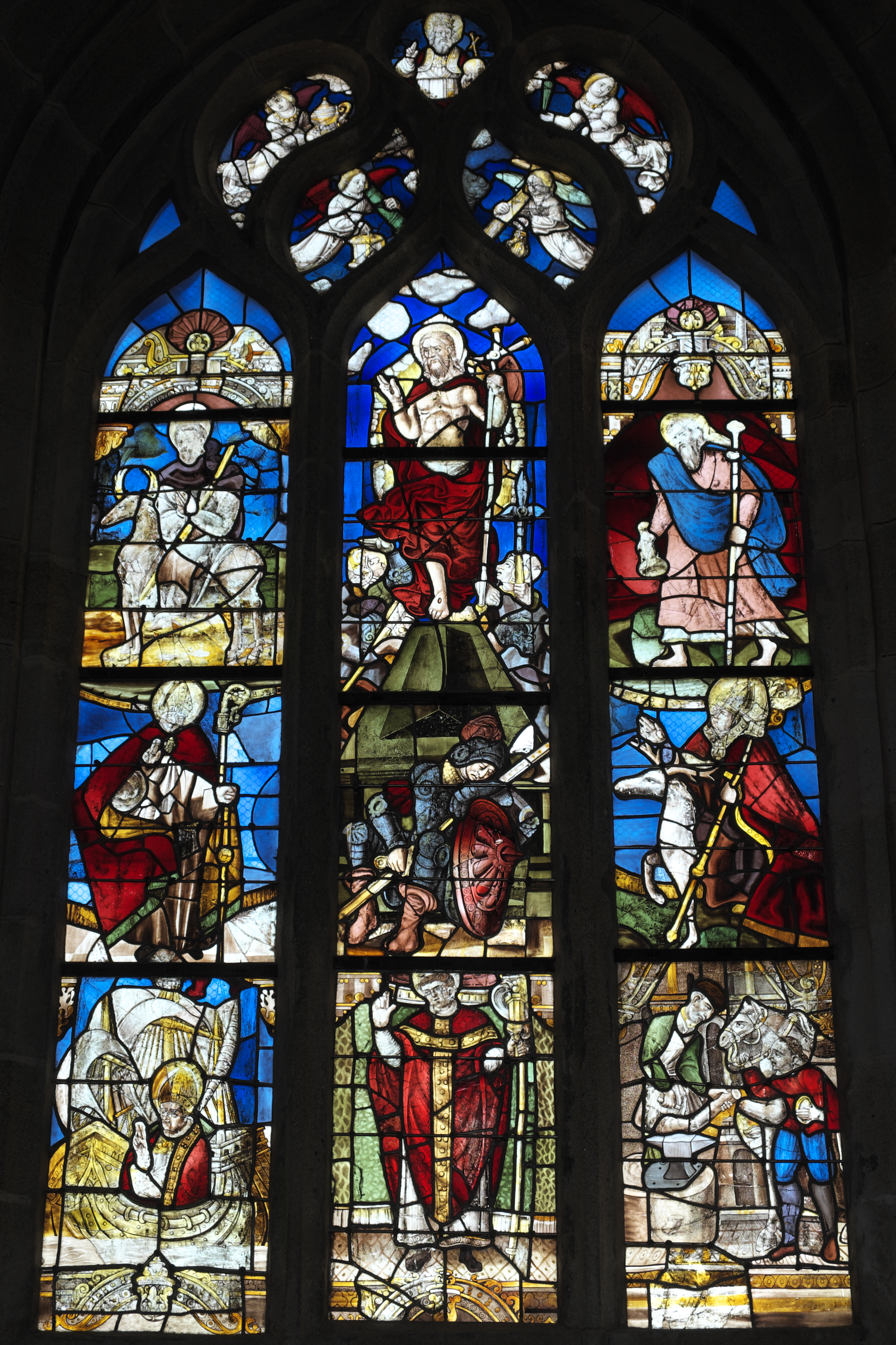 Katholische Pfarrkirche Saint-Thurien in Plogonnec im Département Finistère (Region Bretagne/Frankreich), Bleiglasfenster (baie 7) um 1525/30 und Mitte des 16. Jahrhunderts; Darstellung: Auferstehung Christi (Mitte oben), umgeben von Heiligen